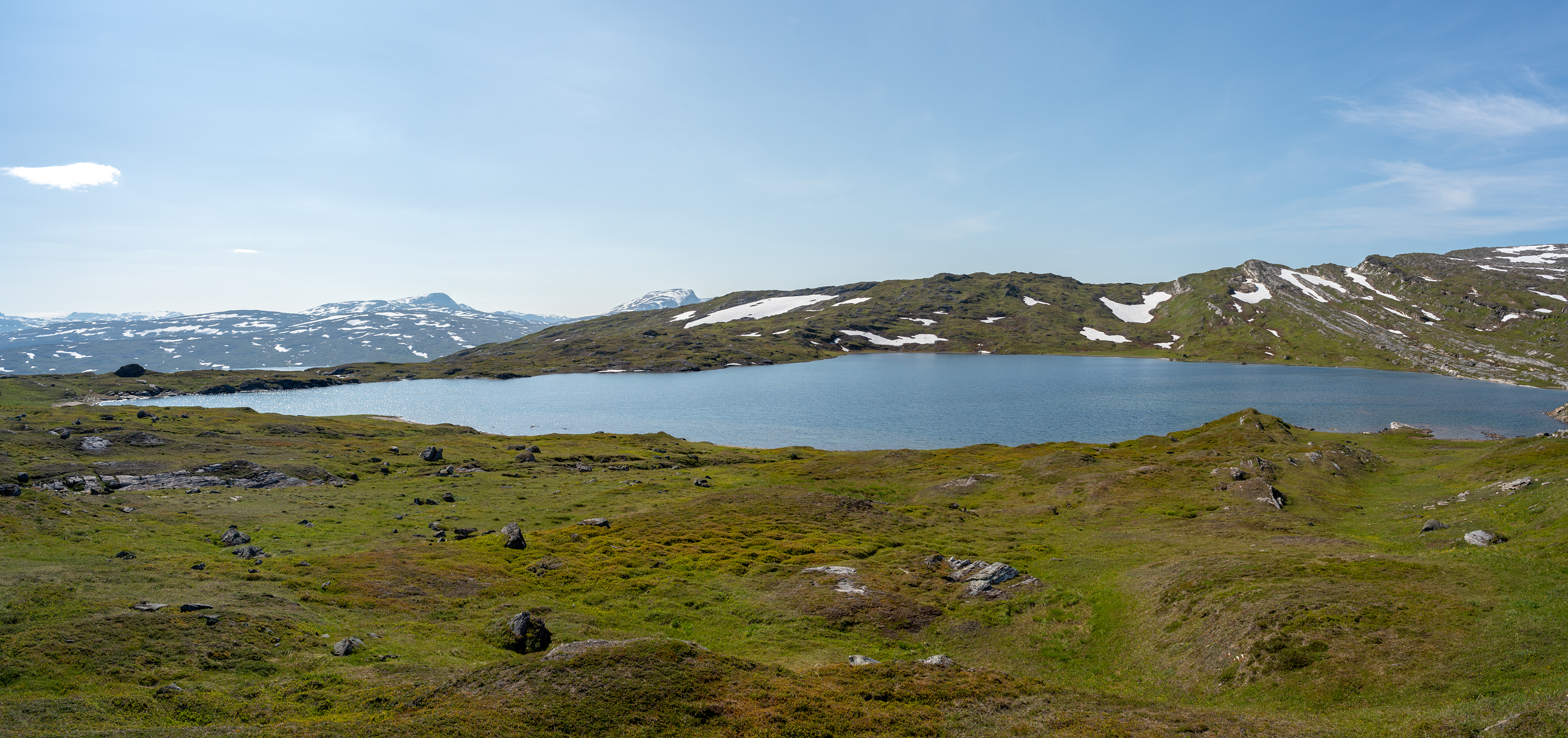 Báktegiesjjávrásj från en liten höjd på östra sidan av sjön.